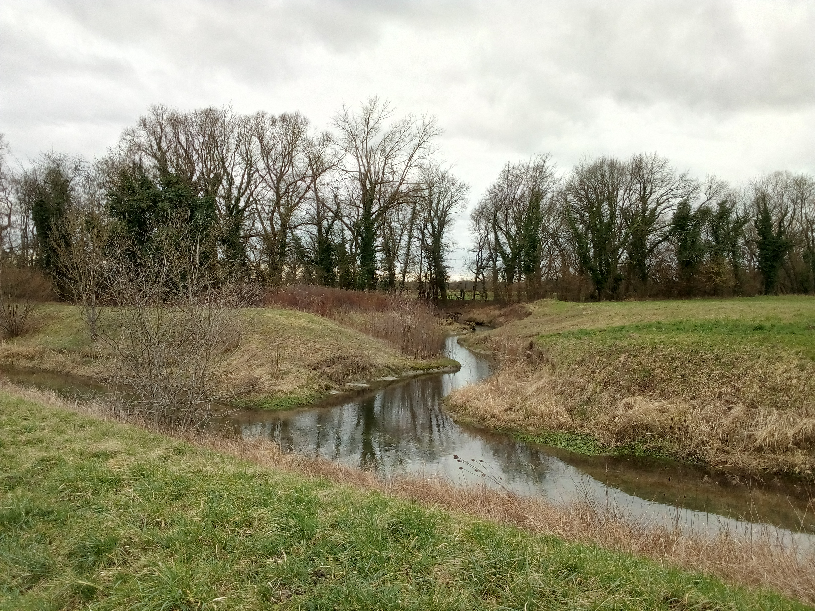 Mündung der Hofwaldschlute in den Riedkanal